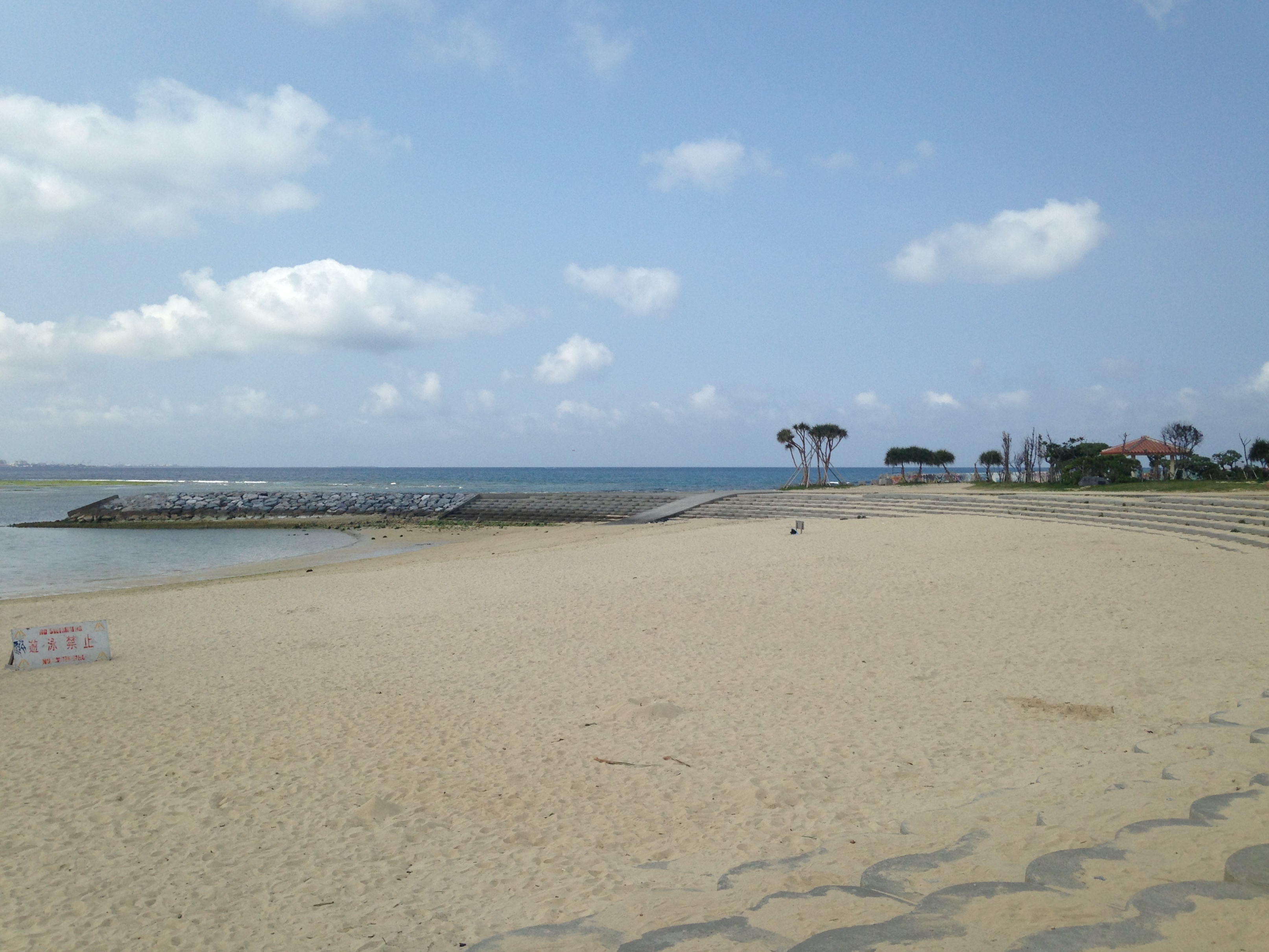 北谷サンセットビーチ